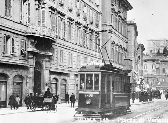 via del plebiscito